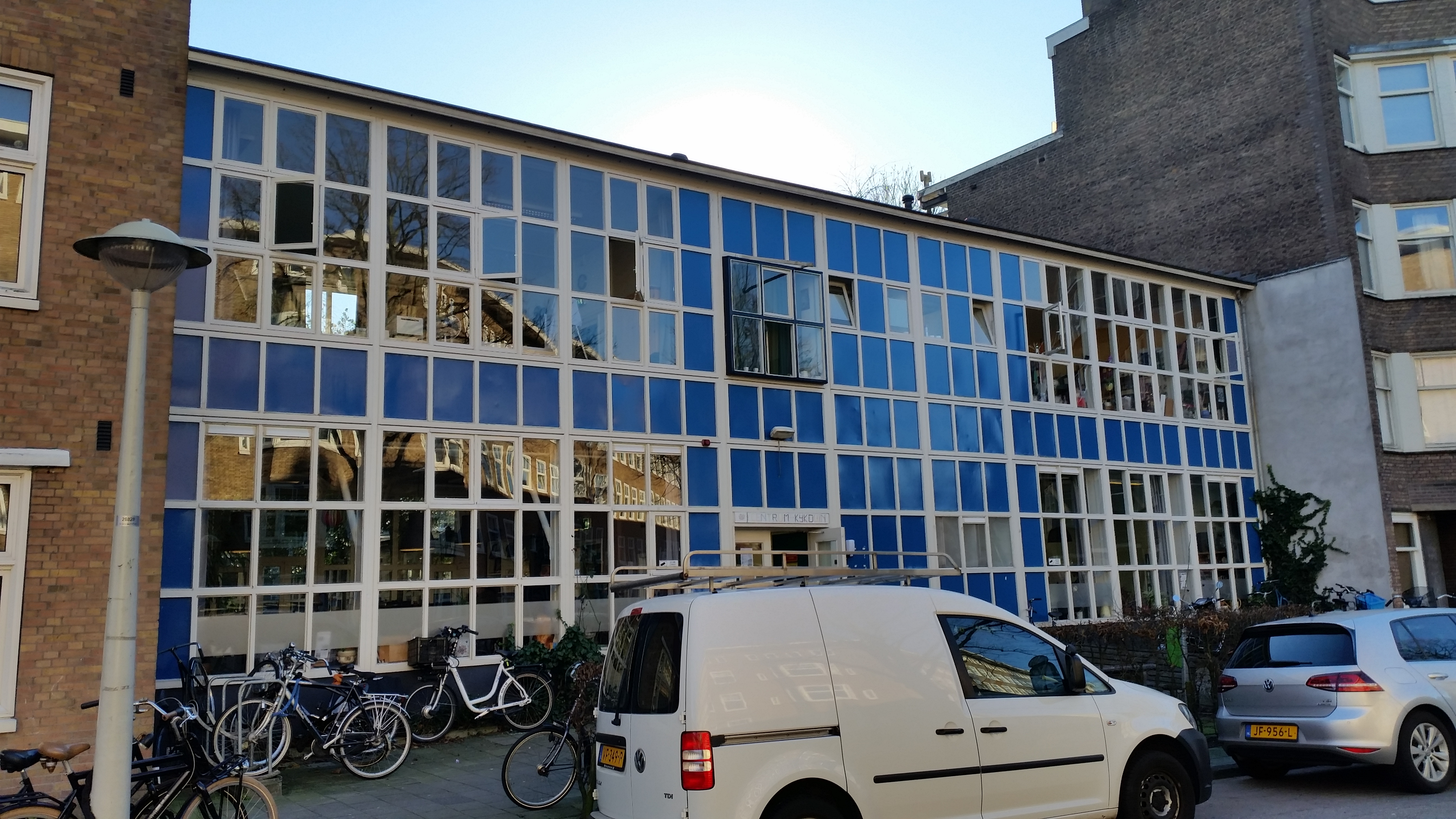 Voormalig schoolgebouw Kijkduinstraat 17; gemeentelijk monument